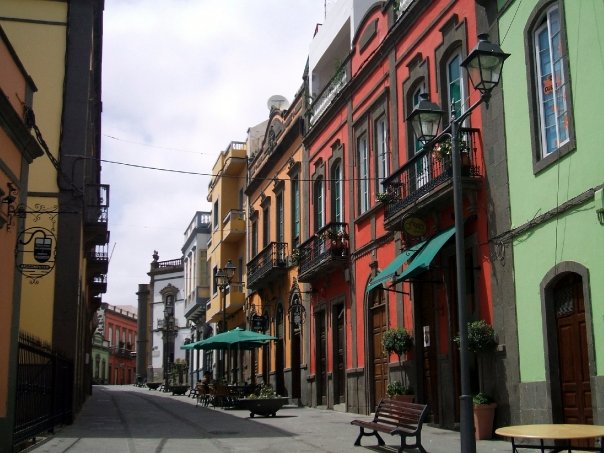 Arucas